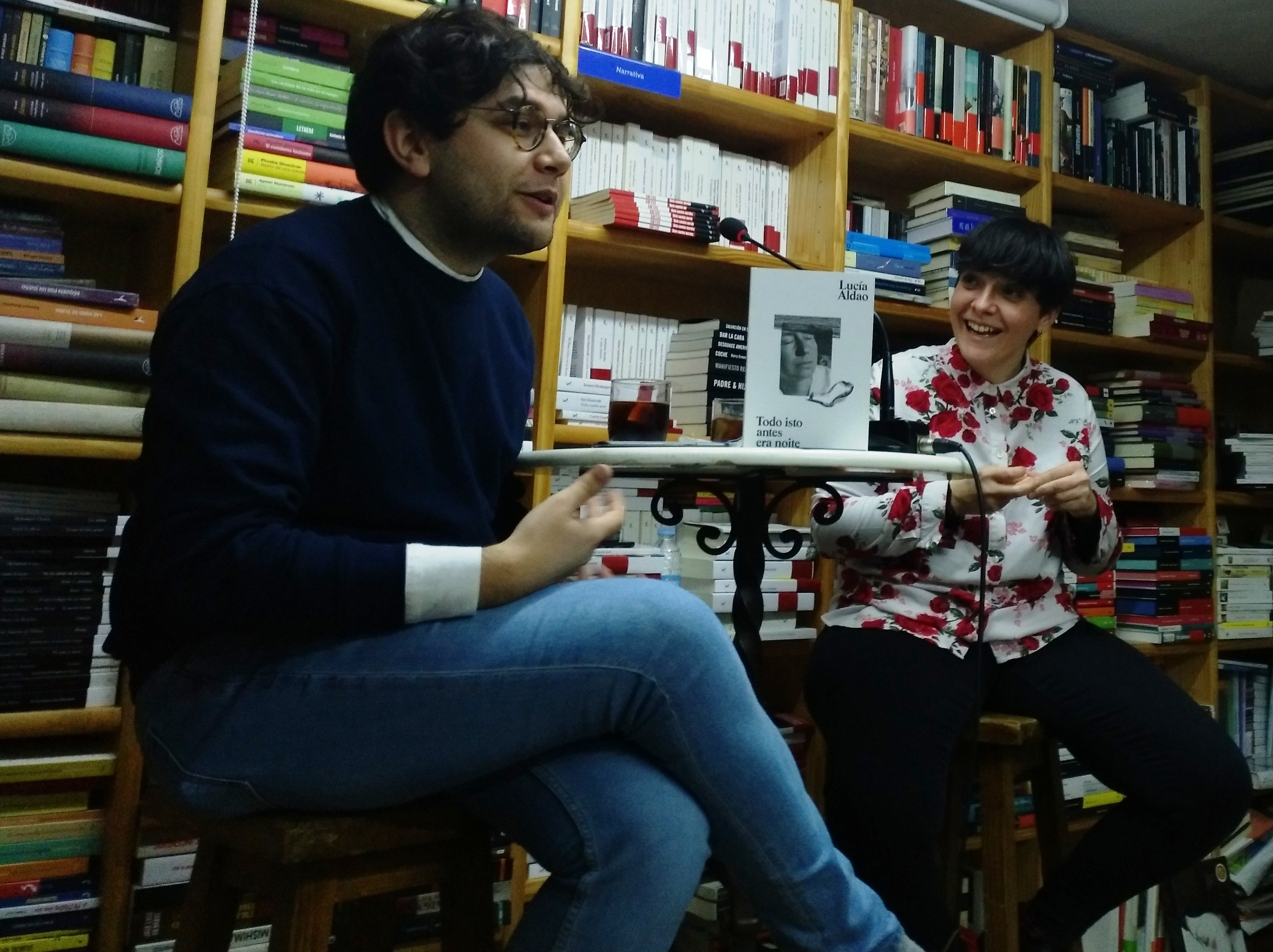 Lucía Aldao e Ismael Ramos na presentación de "Todo isto antes era noite" na Libraría Paz de Pontevedra o 16 de marzo de 2019